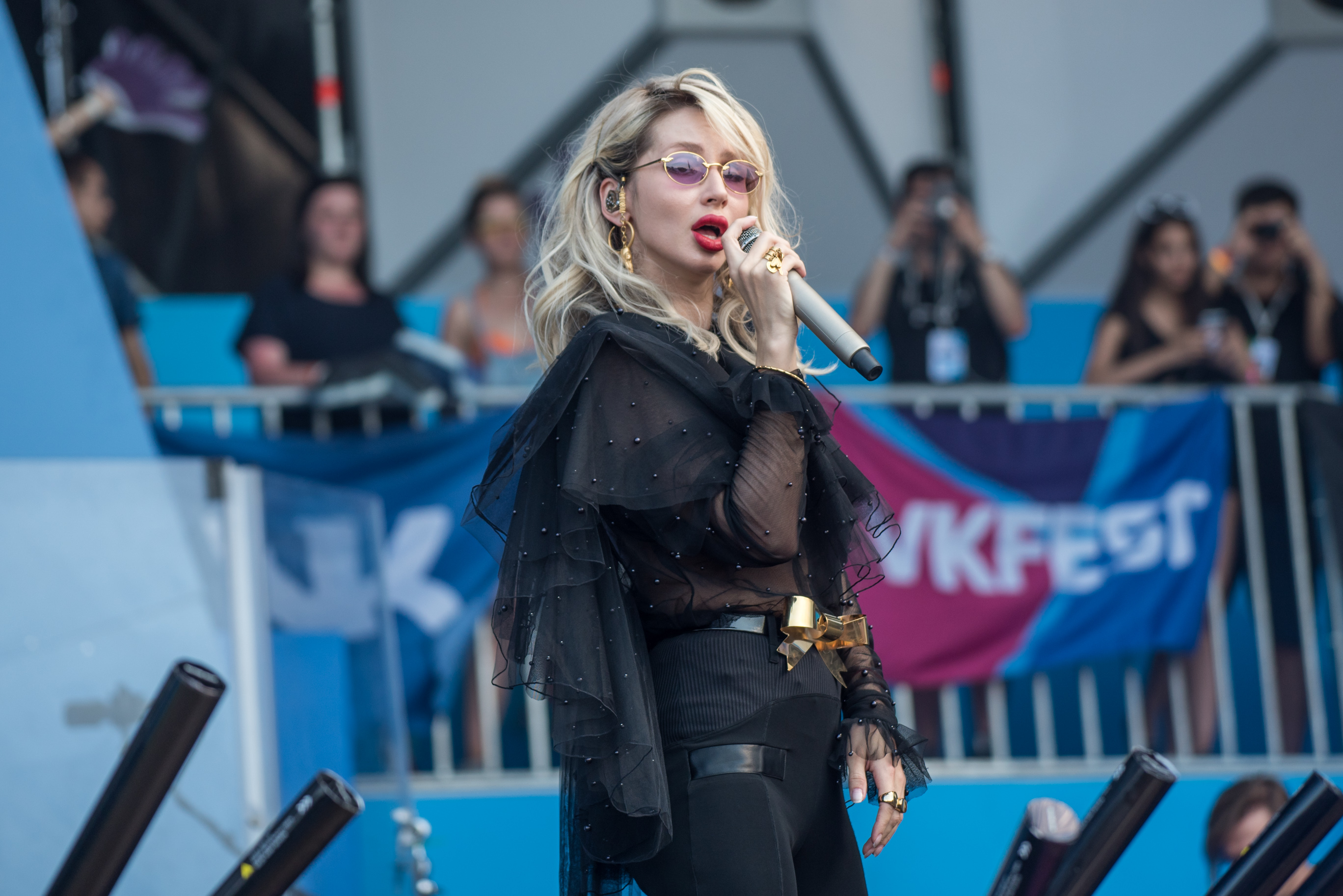 Светлана Лобода на VK Fest 2018